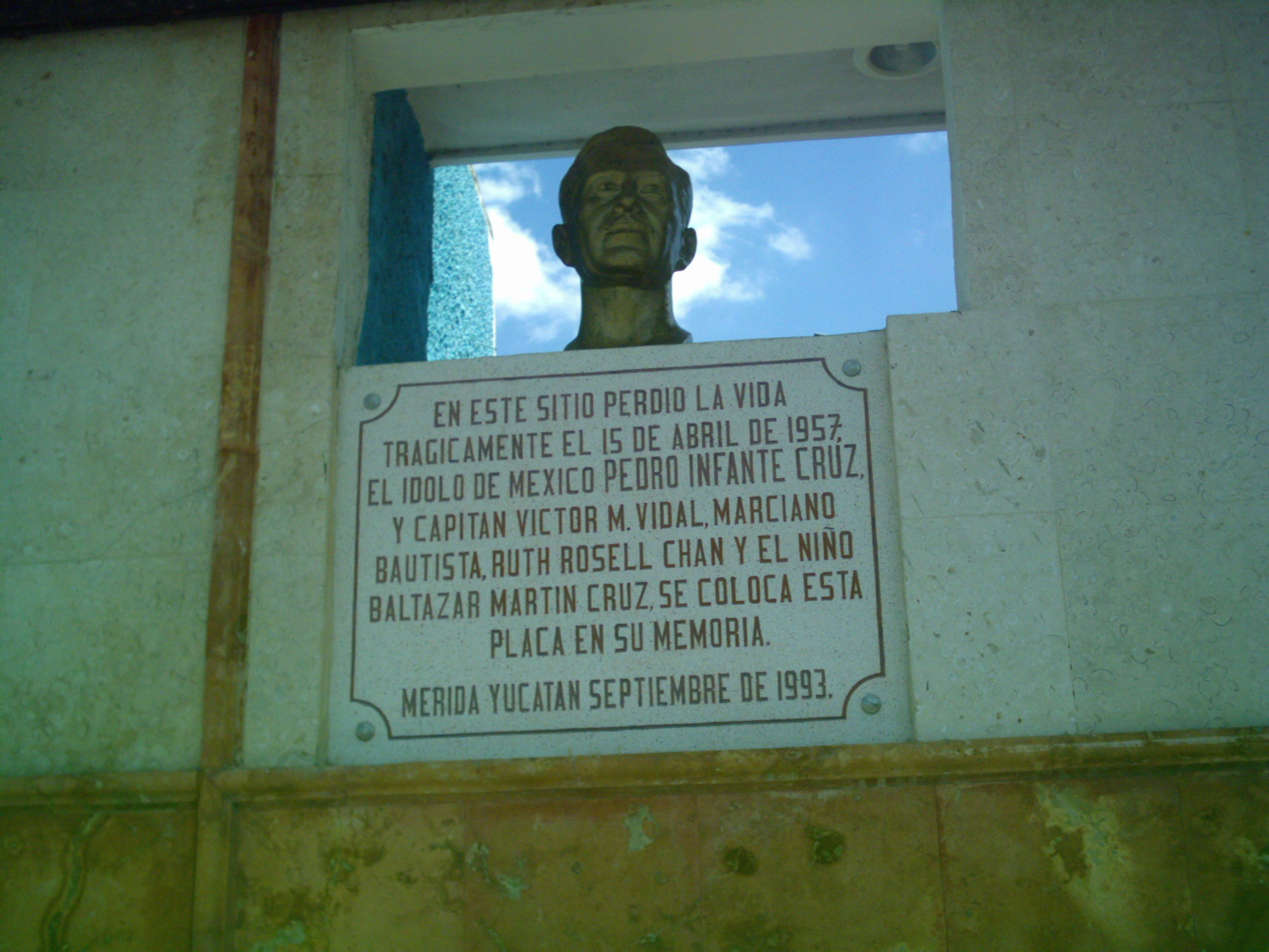 Busto a Pedro Infante Cruz en la vía pública señalando el domicilio donde ocurrió el accidente aéreo donde murió, la obra de arte es de autor desconocido